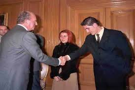 saludo al rey